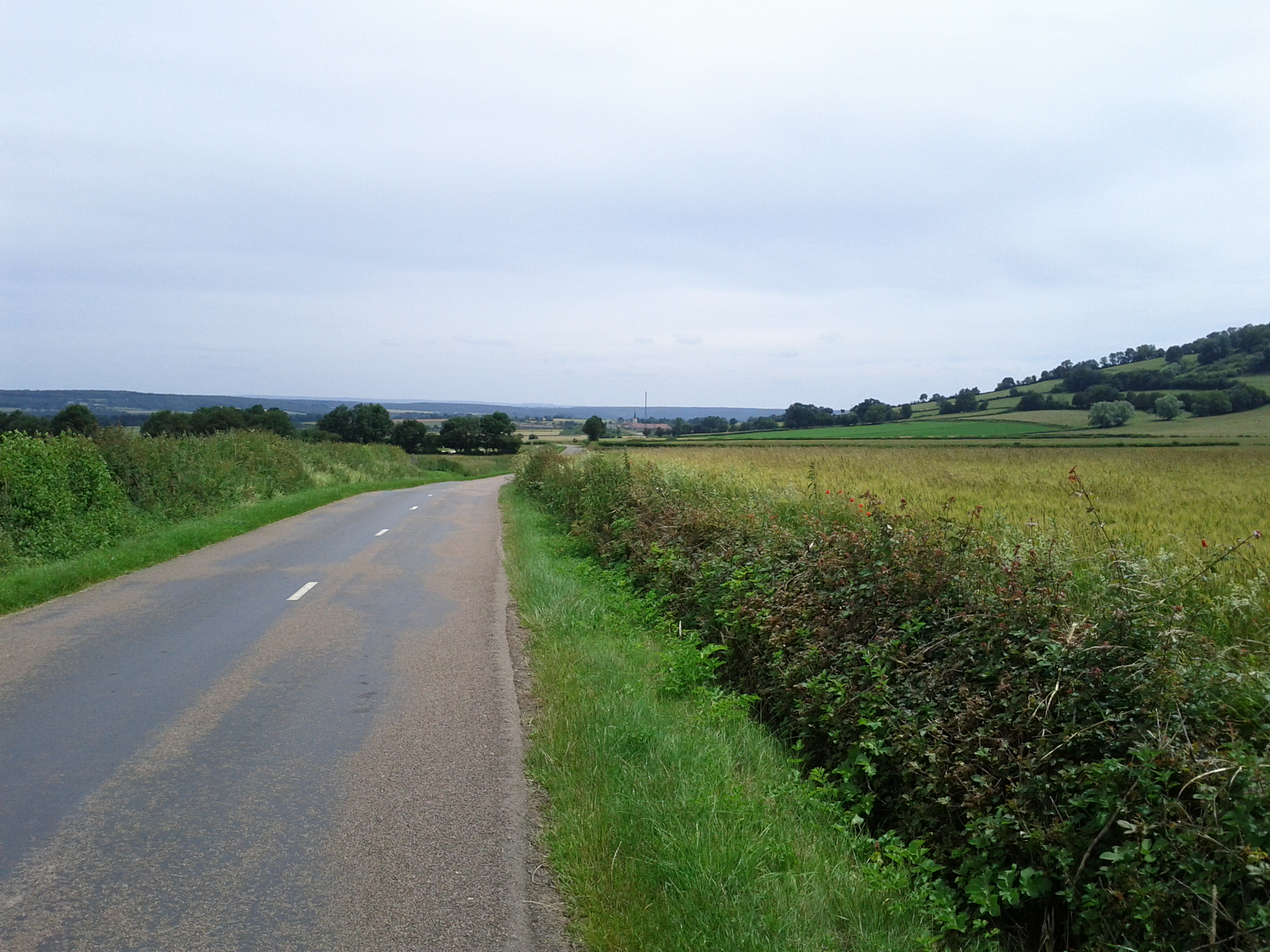 21430 Vianges, France